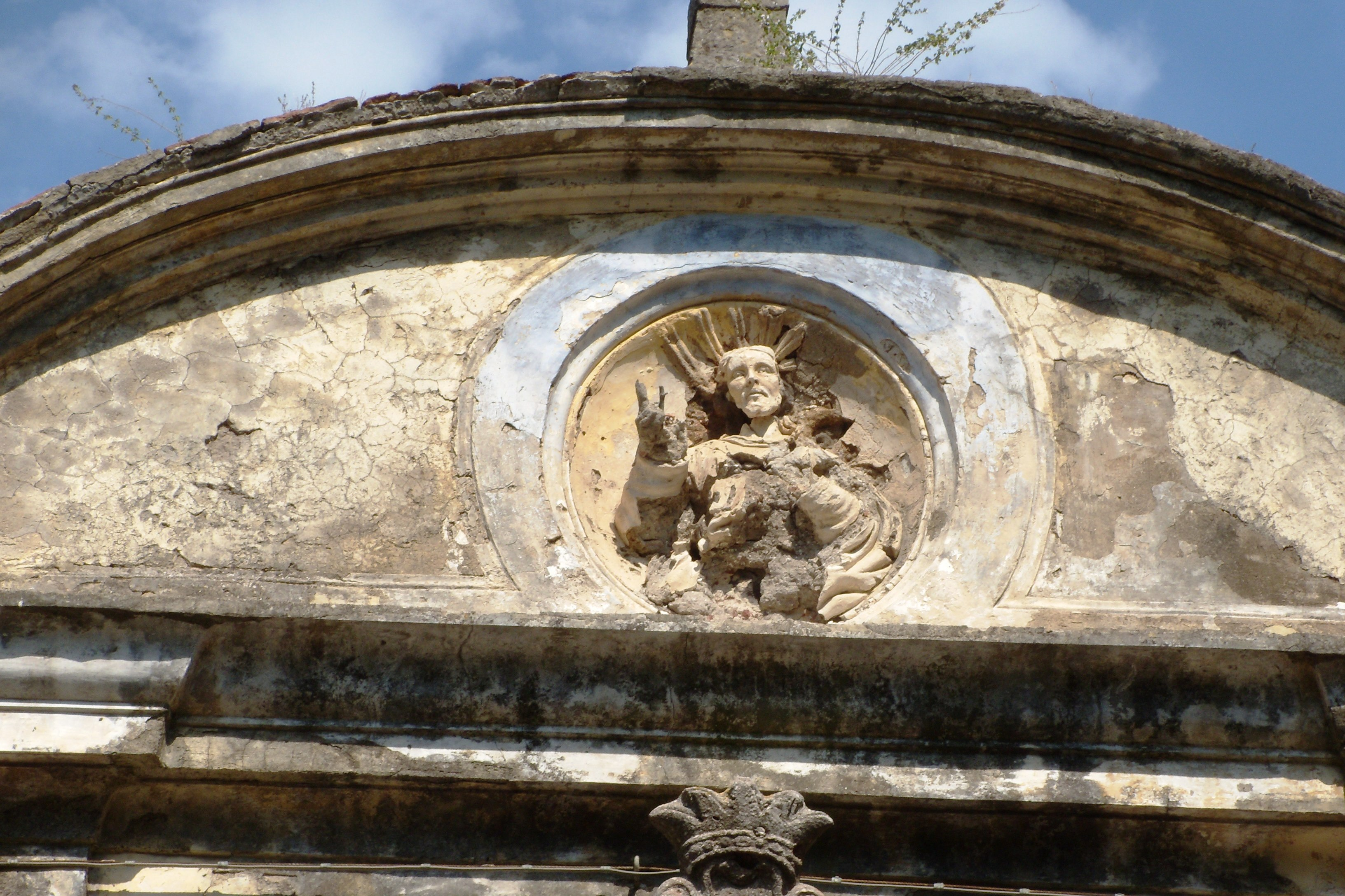 Particolare della facciata dell'oratorio annesso all'Abbazia benedettina. San Salvatore Telesino, provincia di Benevento.